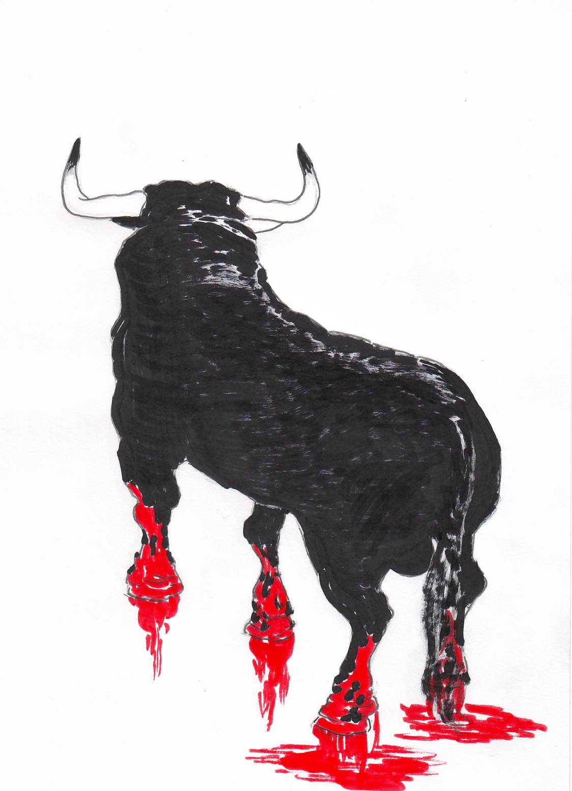 Trabajo propio, dibujado por los usuarios Tolijote y Latemplanza, como ilustración de base para la construcción y diseño del falso logo hecho por Tolijote en homenaje al grupo de teatro independiente La Cuadra de Sevilla.